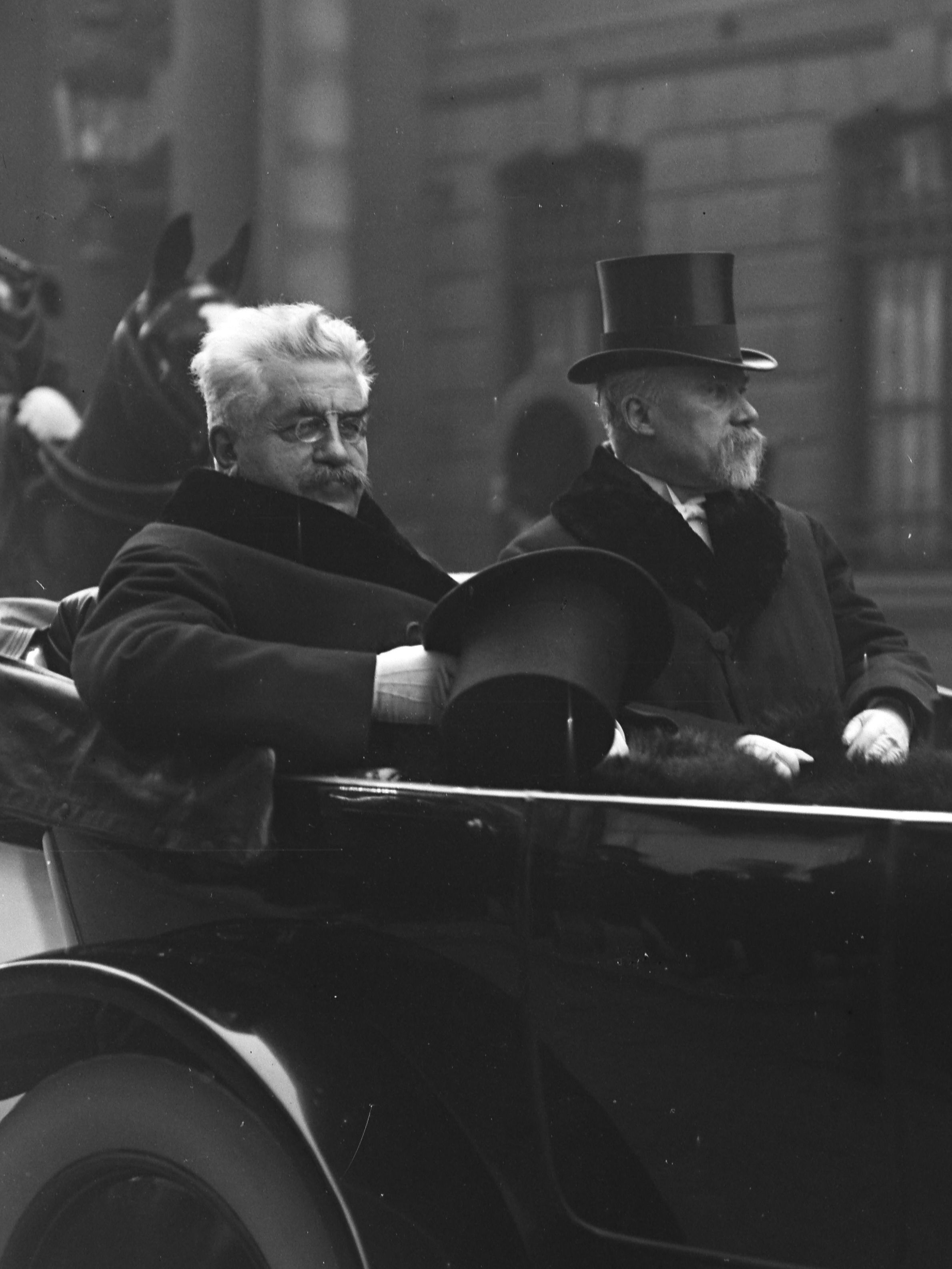 Alexandre Millerand, président de la République française, et Raymond Poincaré, président du Conseil, au palais de l'Élysée.